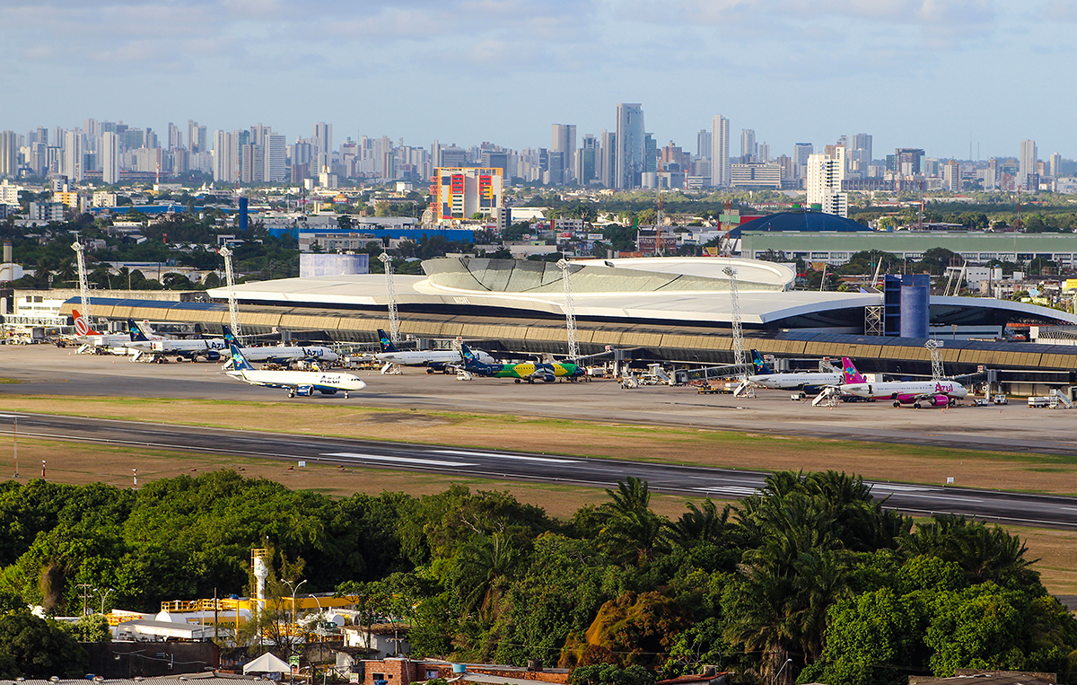 Aeroporto Internacional do Recife/Guararapes - Gilberto Freyre